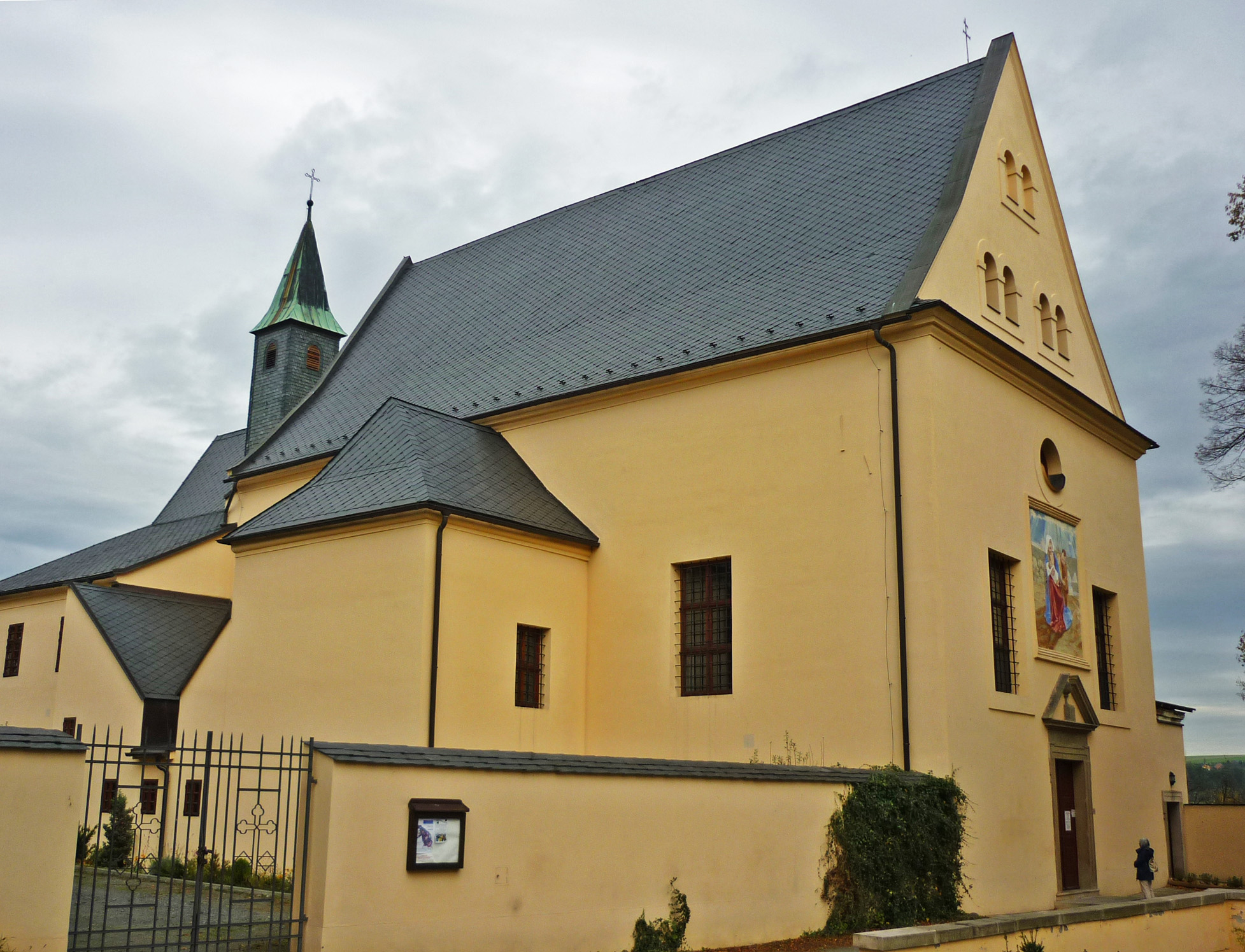 Kirche St. Josef (Kapuzinerkirche) am ehem. Kapuzinerkloster in Fulnek